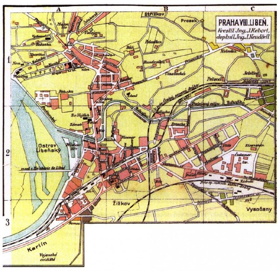 Situační plán staré Libně, rok 1879, doplněný na počátku 20. století